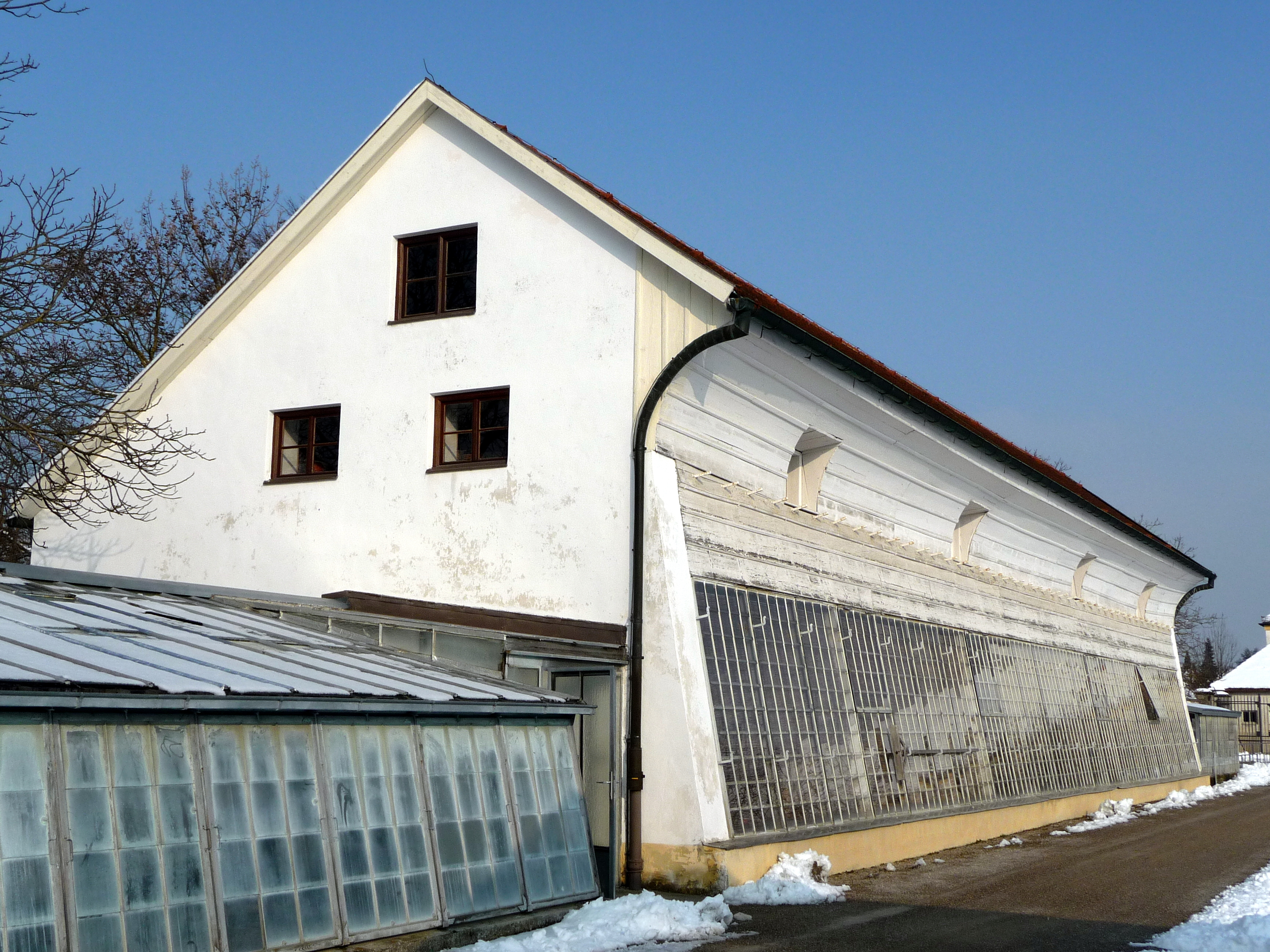 Blick auf das historische Schwanenhals-Gewächshaus im Schlosspark Nymphenburg.